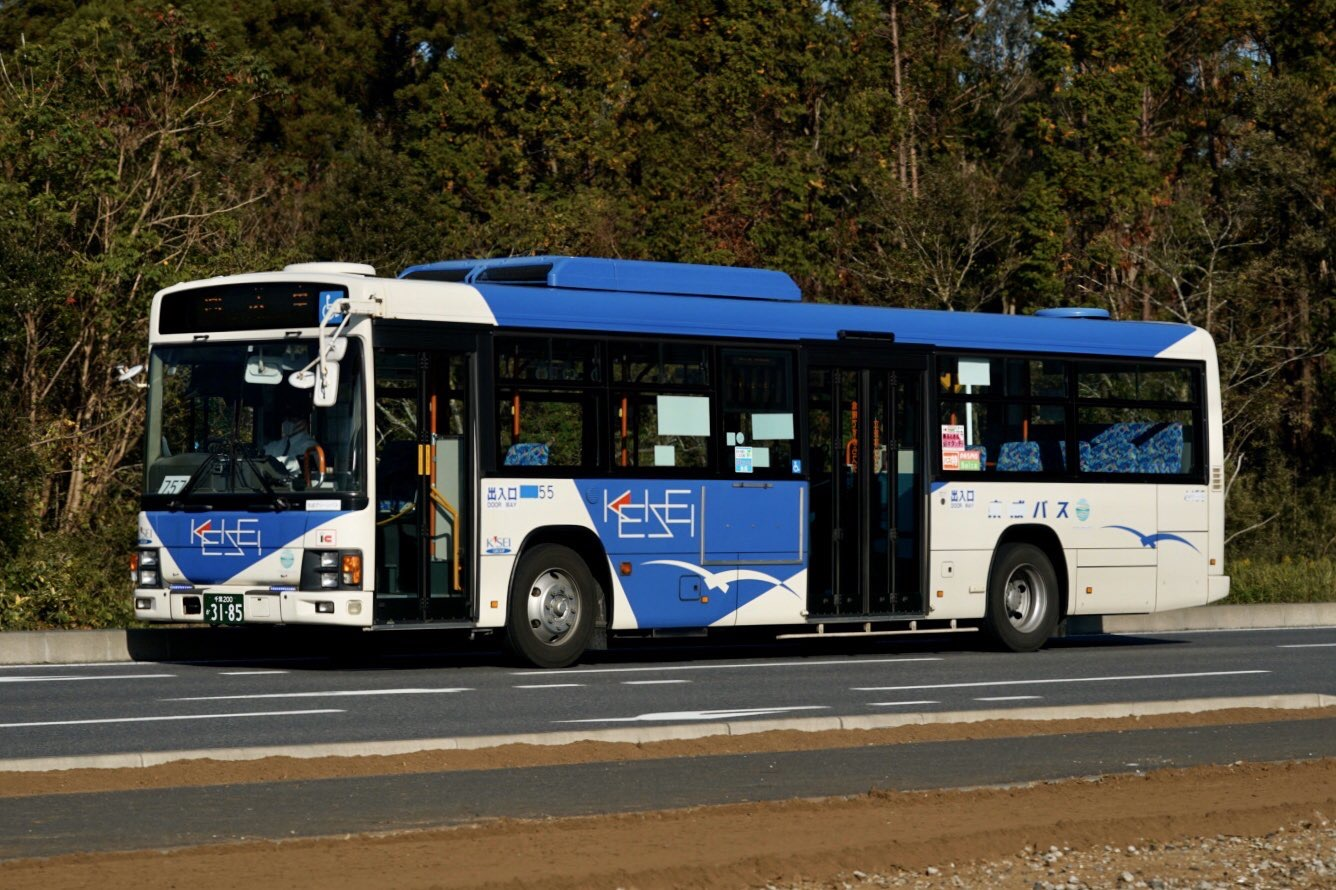 千葉200 か 31-85 酒々井プレミアムアウトレット線